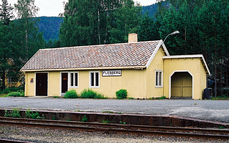 Flesbaerg stasjon, Numedalsbanen. Bygd 1924. Arkitekt: NSB v. Gudmund Hoel.